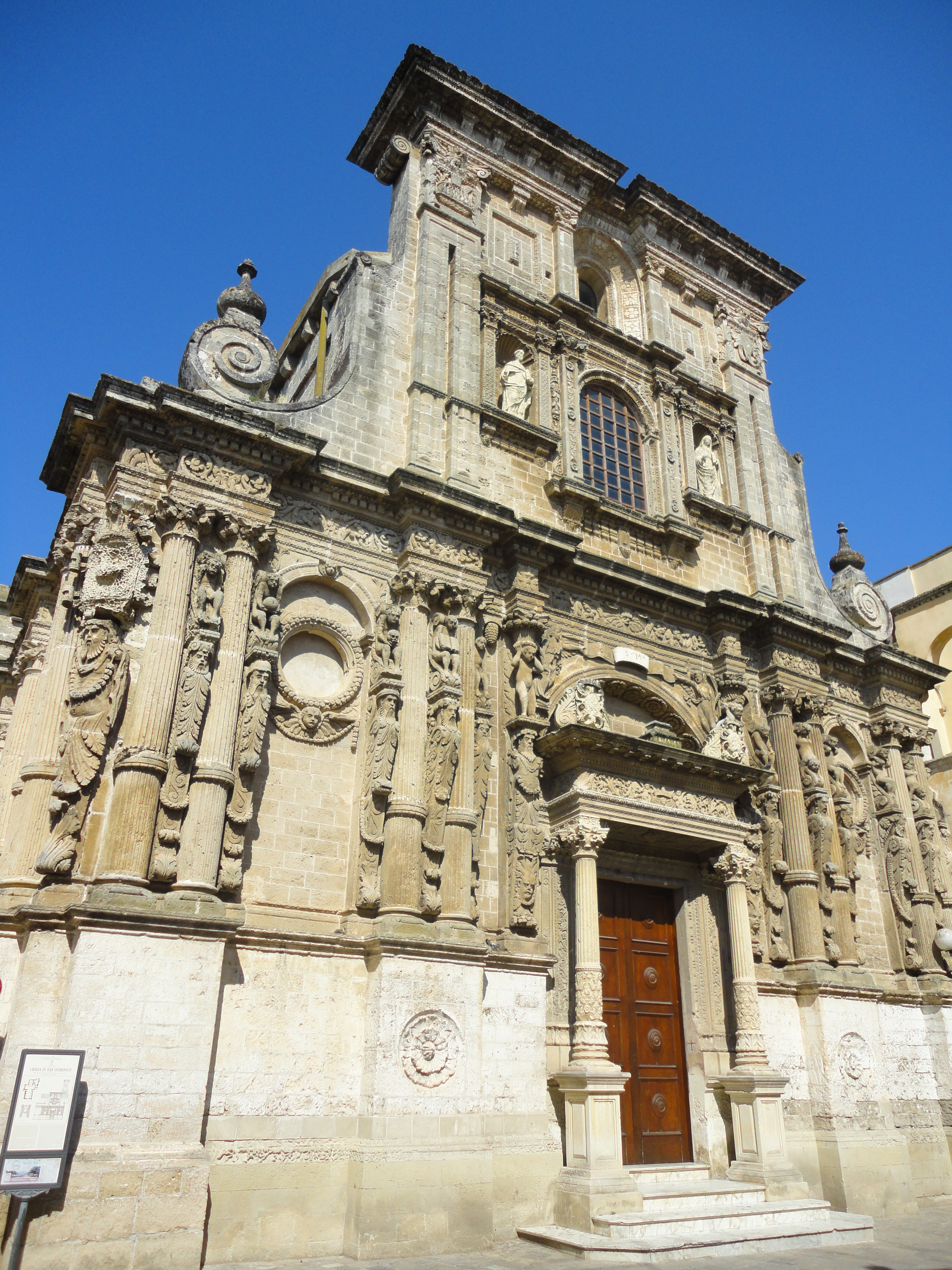 Chiesa di San Domenico di Nardò, Lecce